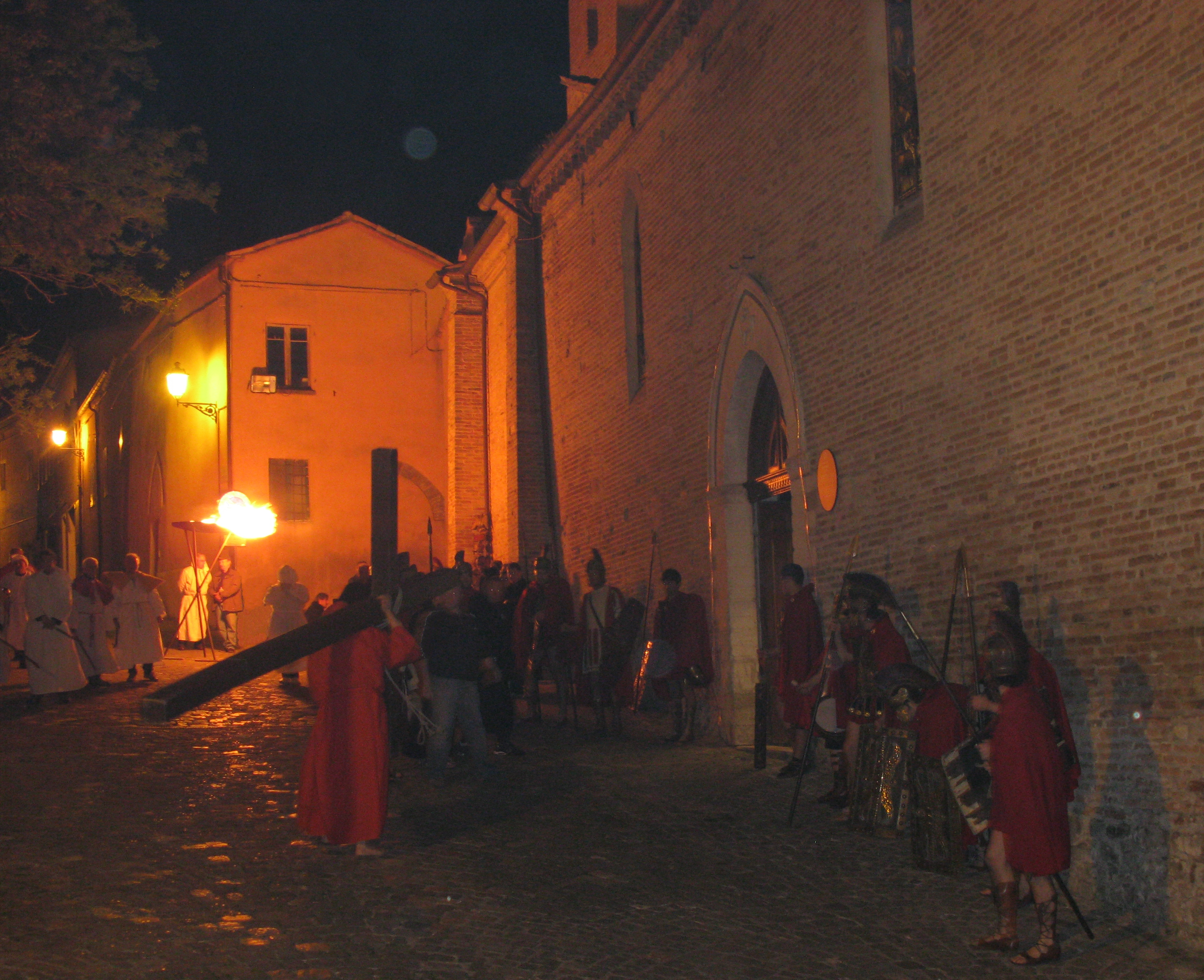 Montefiore Conca, secolare processione del Venerdì Santo.